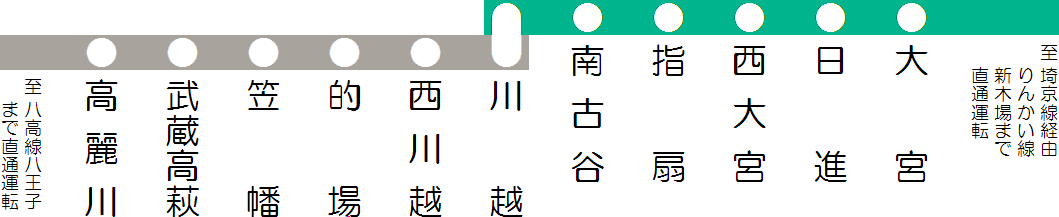 東日本旅客鉄道 川越線の路線図。